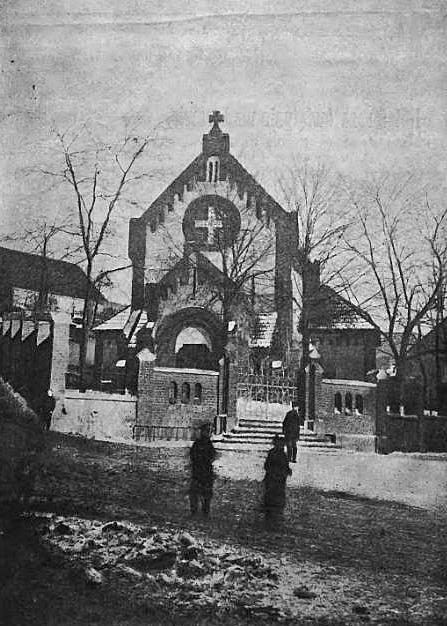 Kościół św. Jana Chrzciciela we Lwowie (1905)